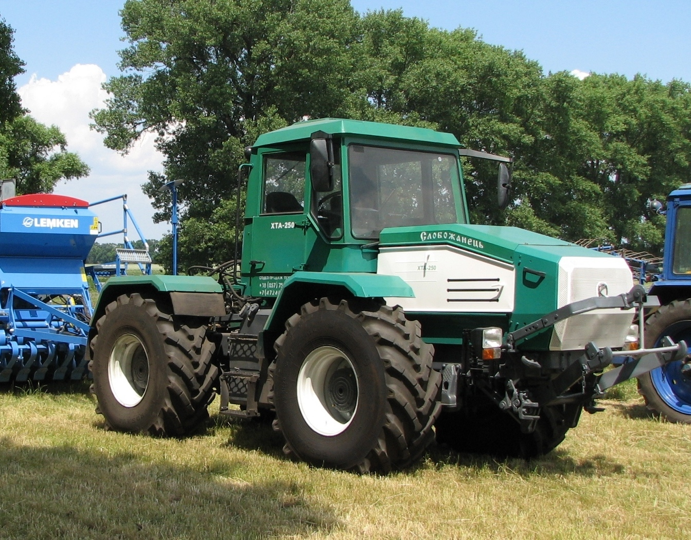 ХТА-200 "Слобожанец"